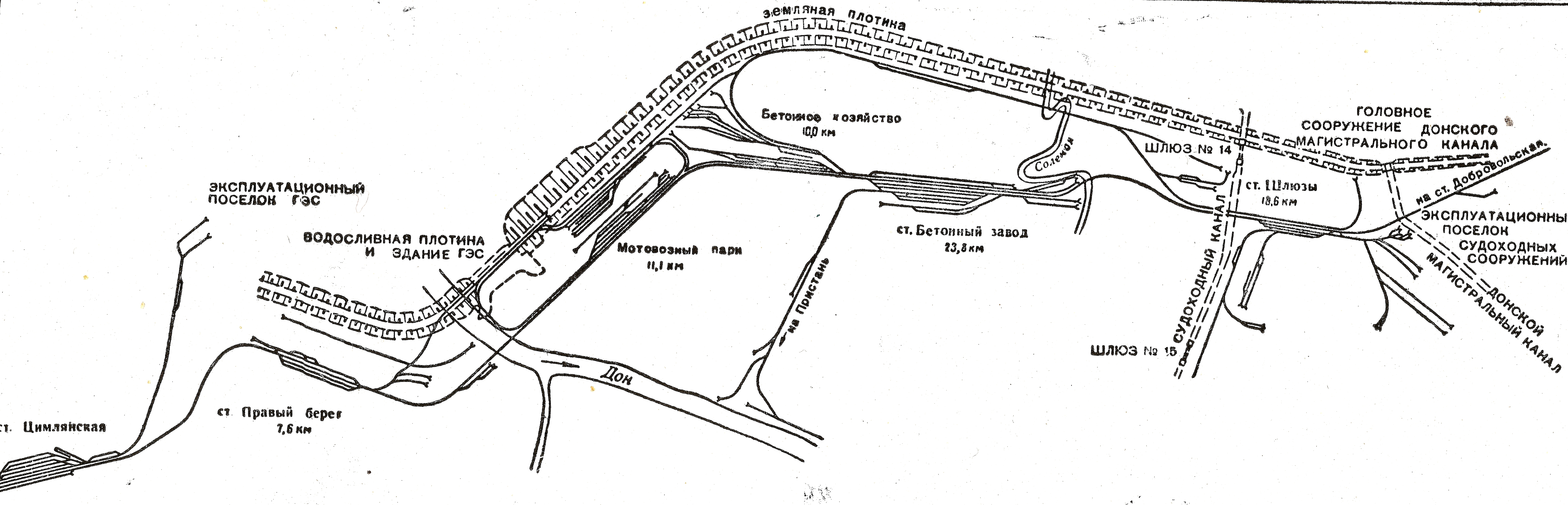 Схема строительства Цимлянского гидроузла